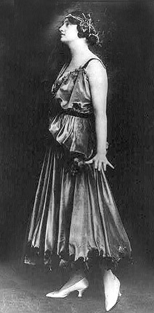 Jeanne Paquin Gown